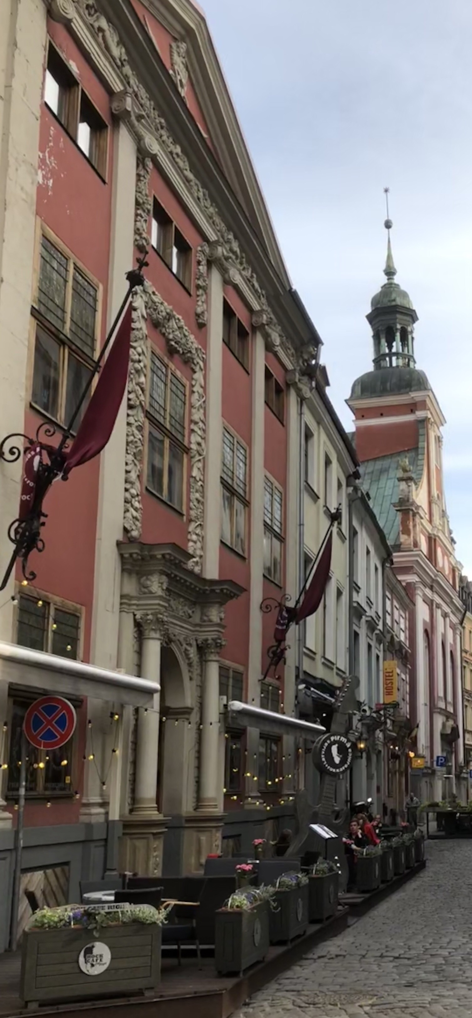 von Reuternsches Haus in Riga